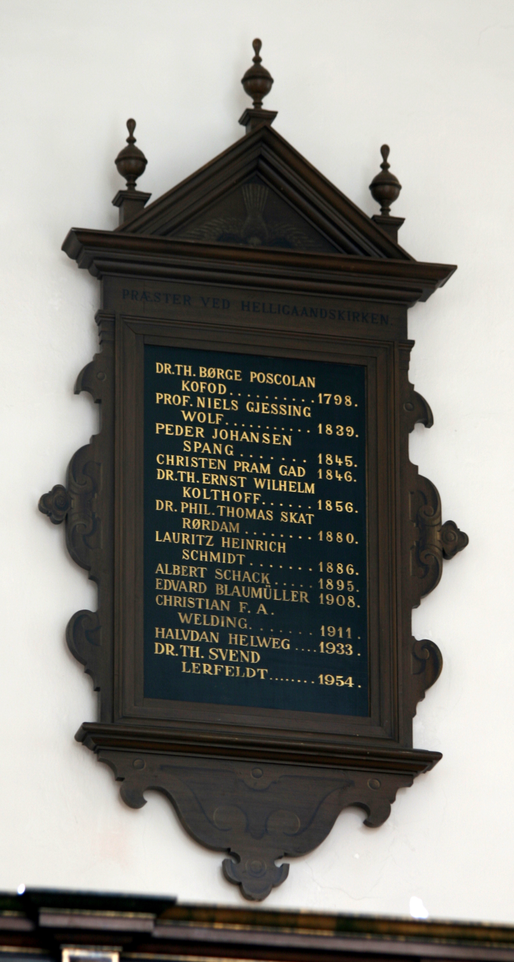 Helligåndskirken, Copenhagen, Denmark. Series pastorum, part 4. 1798-1954.